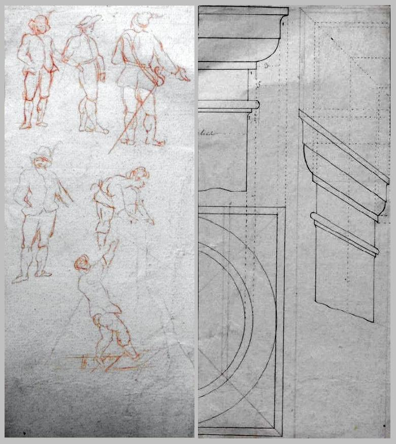 Двухстороннее изображение, созданное Luca Carlevaris: наброски к картине и архитектурные чертежи.